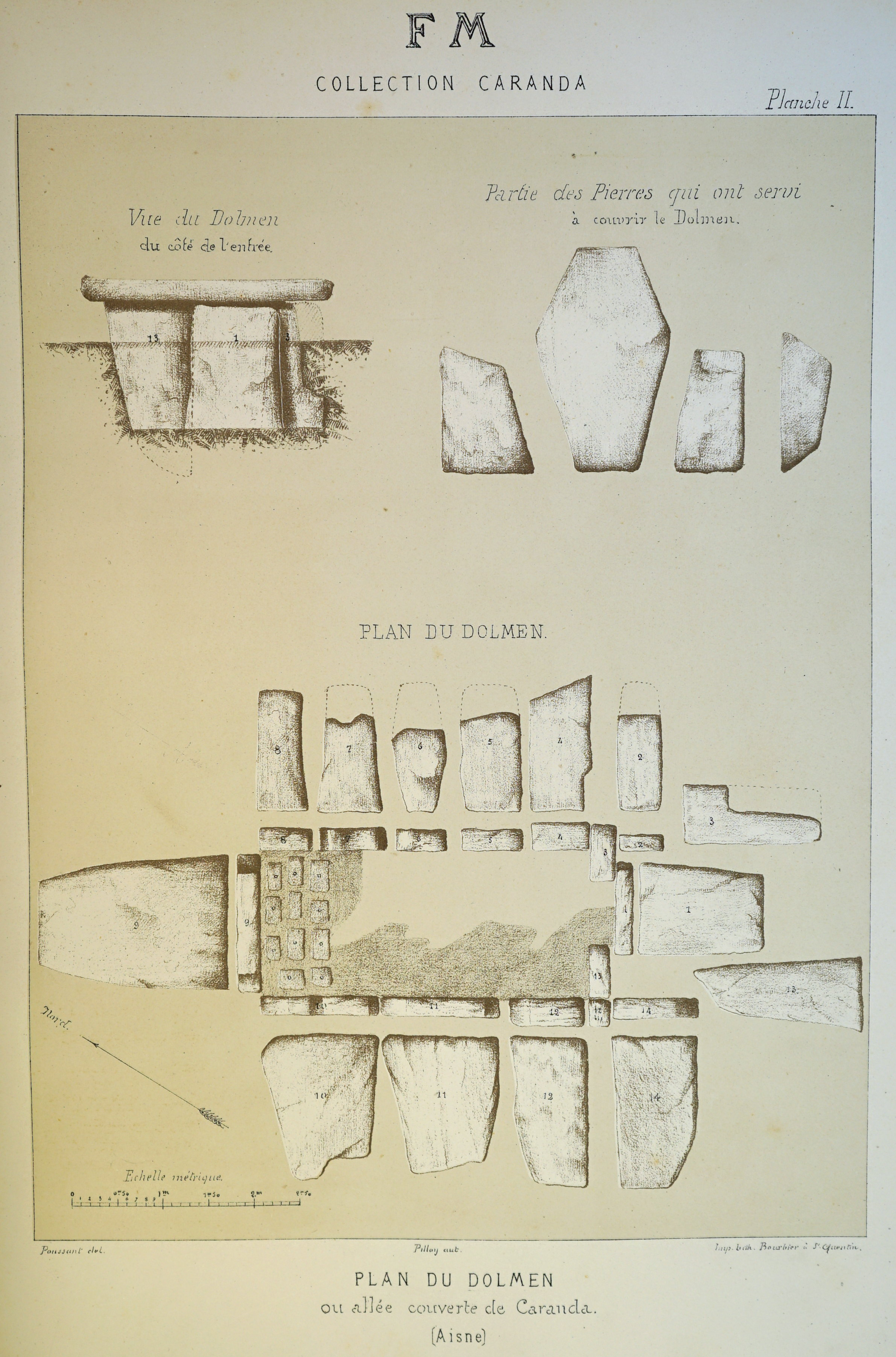 dessin de Pilloy des fouilles de Frédéric Moreau.